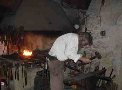 Beim Schmieden eines historischen Geländerstücks